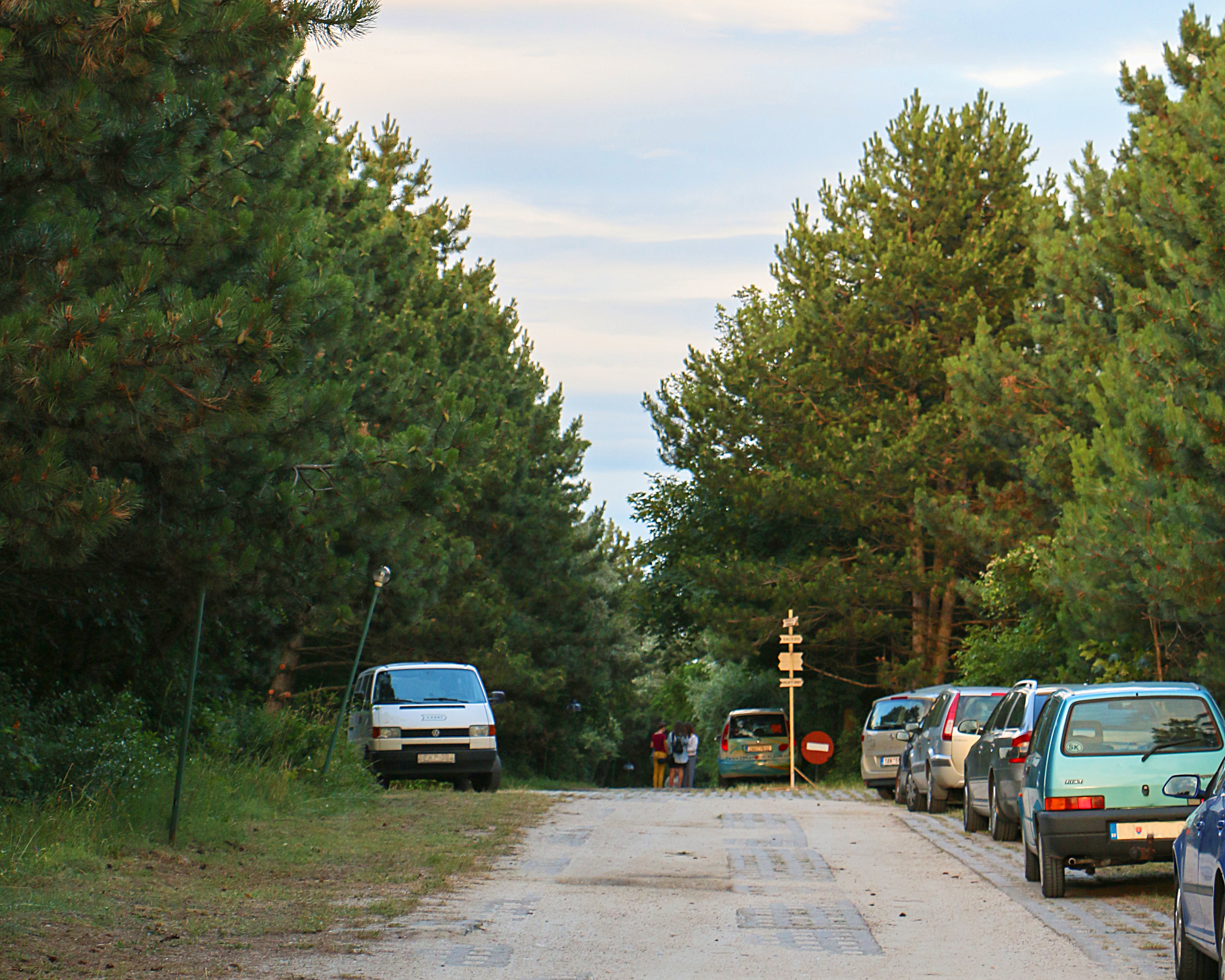 Út és parkoló a Zsámbéki Színházi és Művészeti Bázison, nem messze a bejárattól